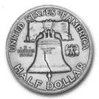 Benjamin Franklin half dollar (back)